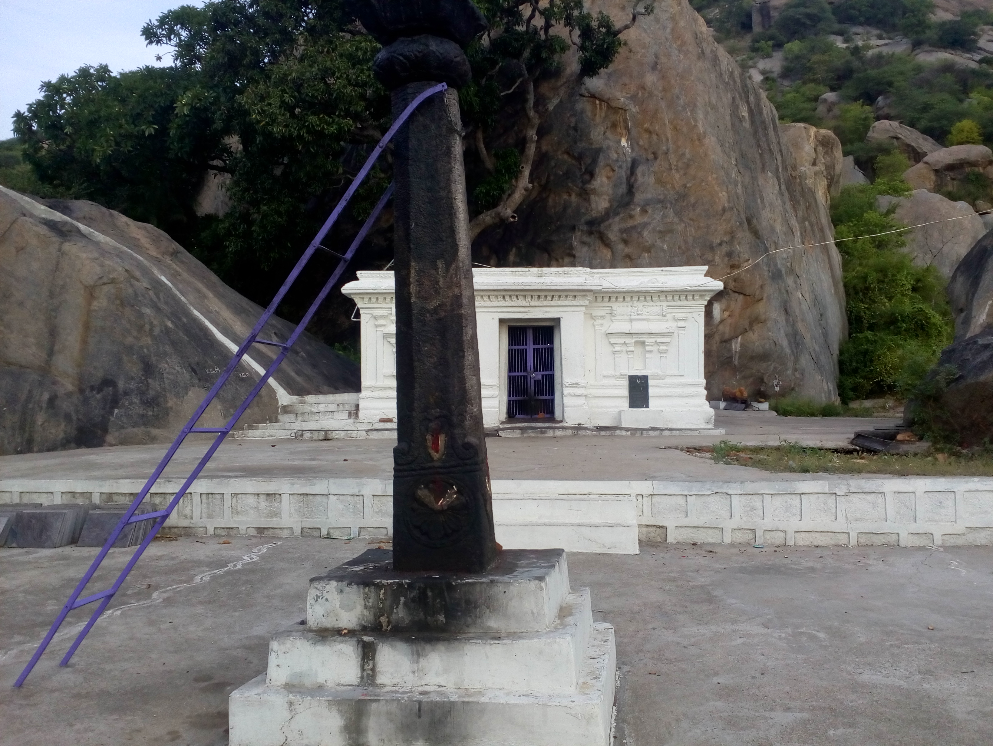 நரசிம்ம பெருமாள் கோயில்